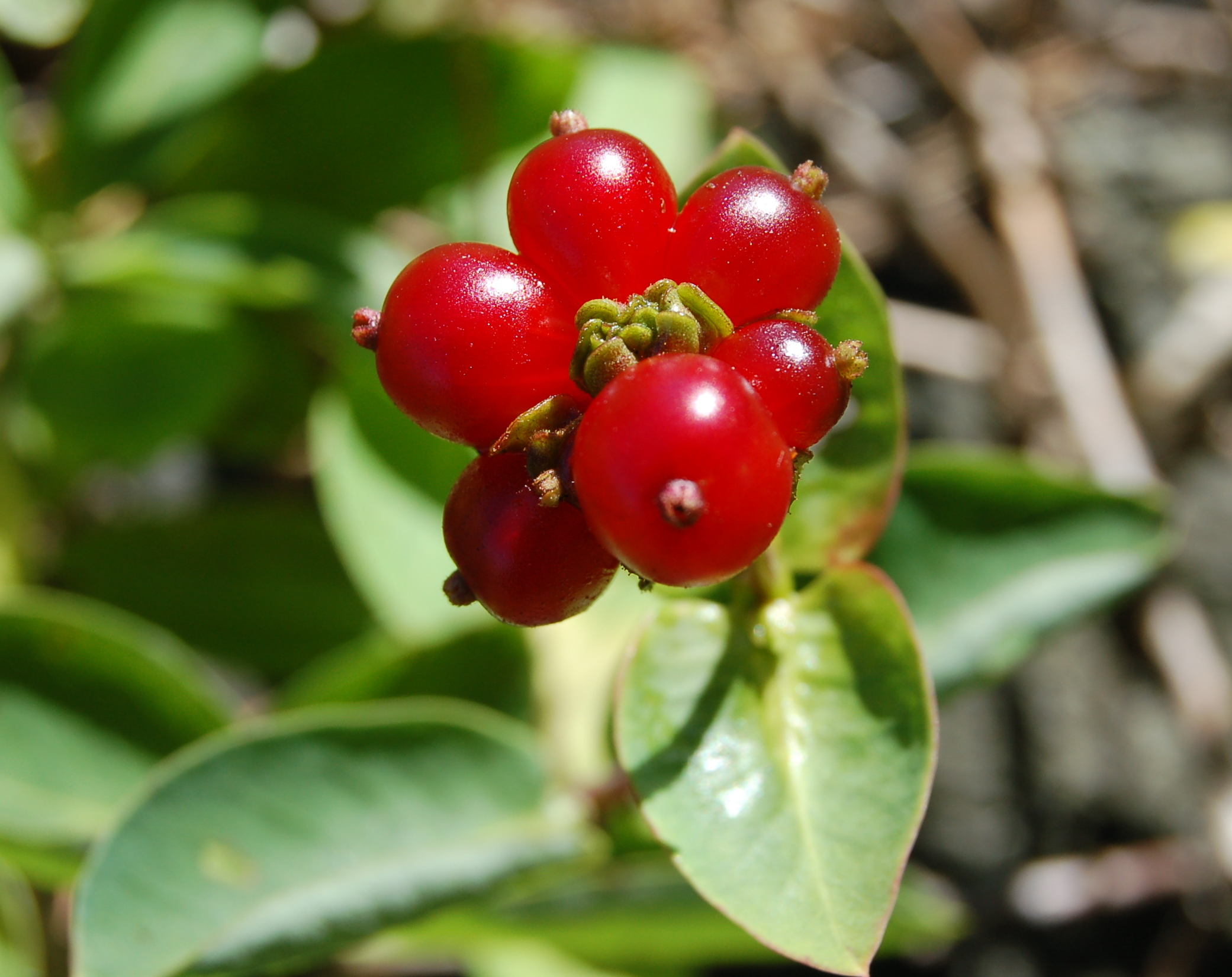 Vivendel - bær